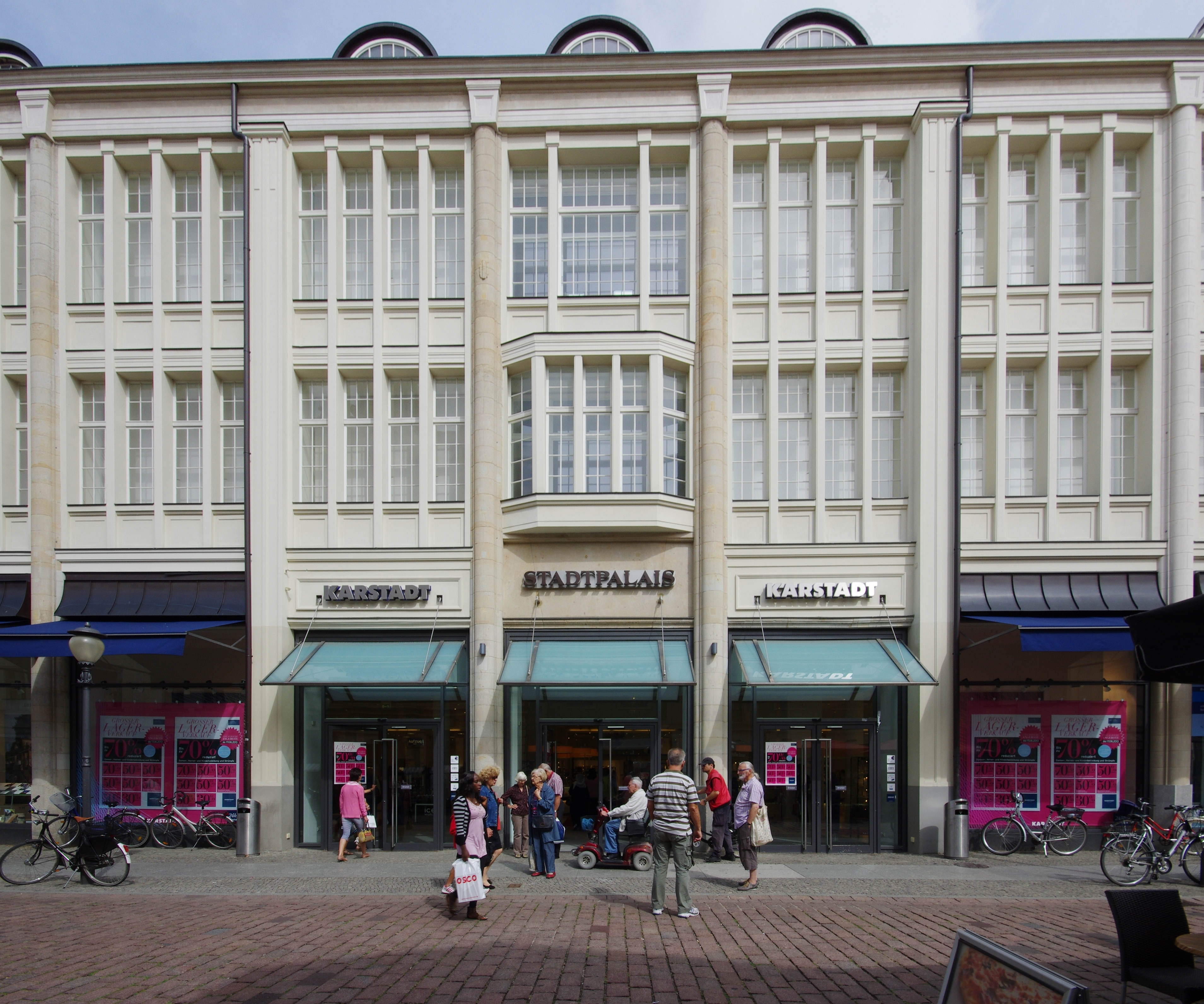 Potsdam in Brandenburg. Das Haus in der Straße Brandenburger Straße 49 bis 52 steht unter Denkmalschutz.